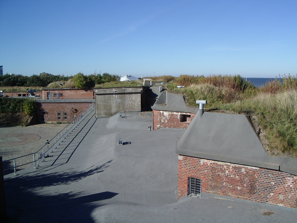 Fort Kugelbake, in Cuxhaven-Döse. Prussian Navy Fort, 1870. Photo taken by User:Geoz. Cuxhaven 2005.